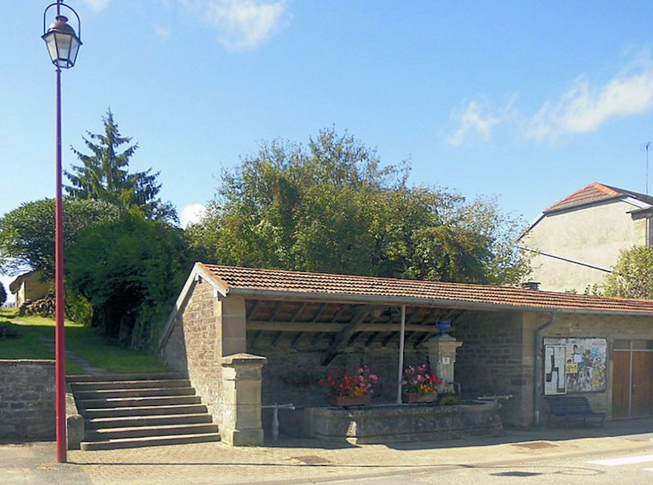 Lavoir d'Alaincourt (21 Rue des Fontaines-Fleuries)